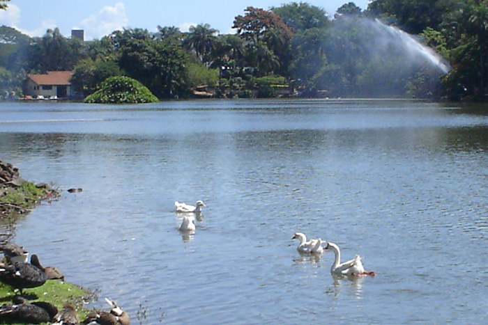 Lago em Araras - SP